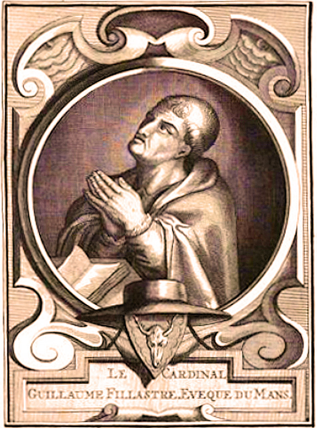 Cardinal Guillaume Fillastre, obédience antipape Jean XXIII